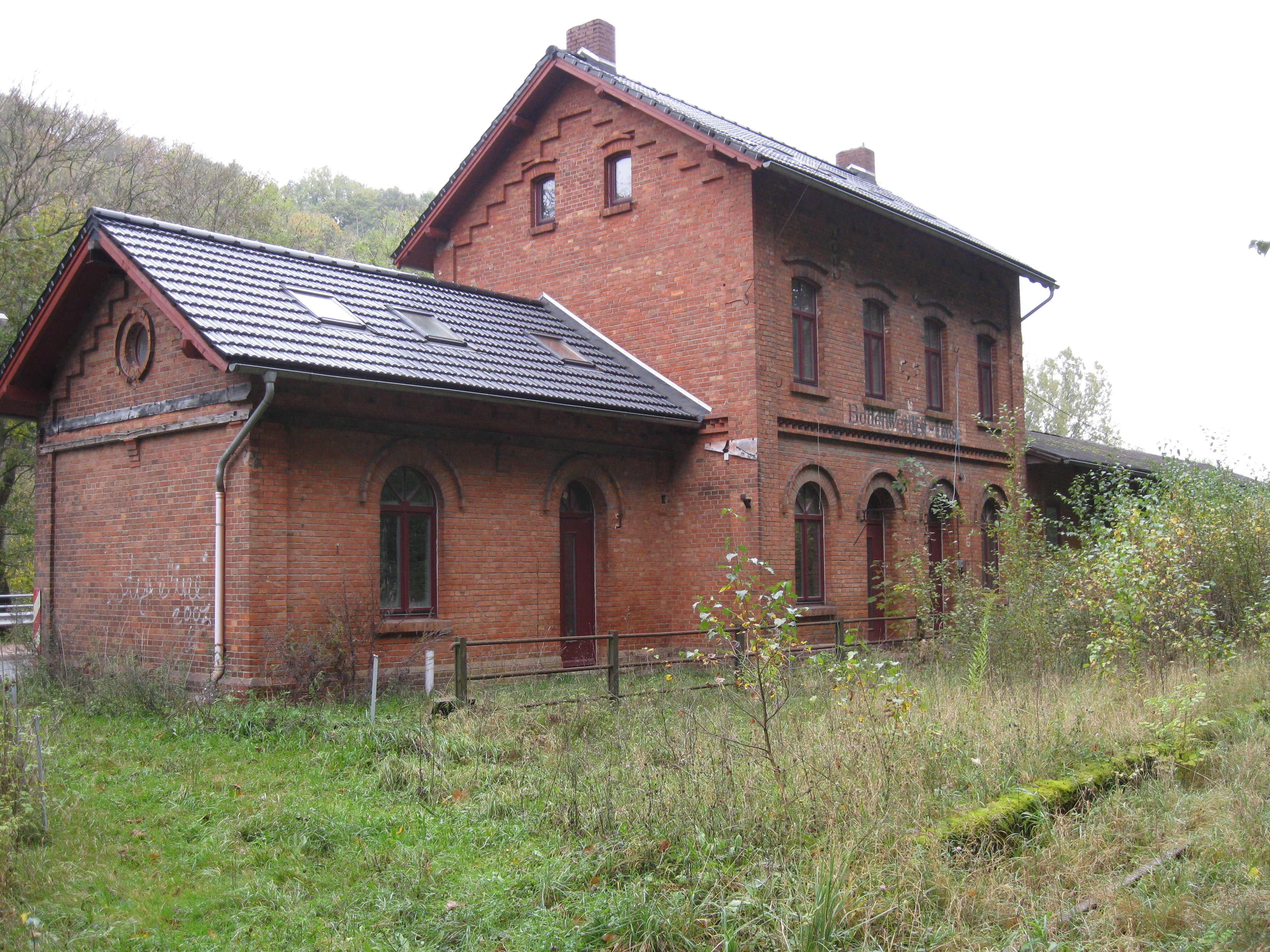 Den nedlagte banegård Bodenwerder Linse, Tyskland